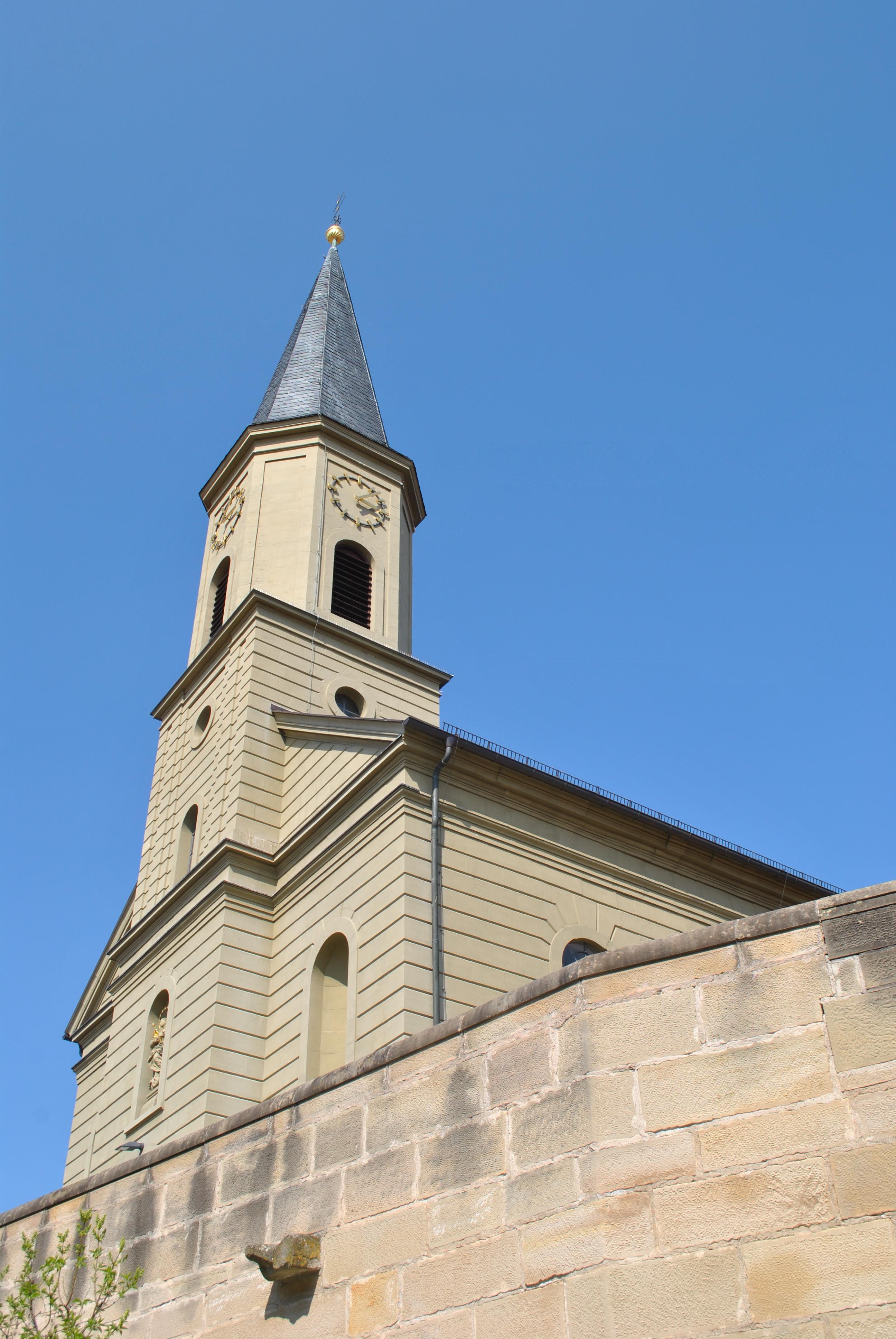 Katholische Pfarrkirche St. Peter und Paul Saalraum mit eingezogenem Polygonalchor, von Thaddäus Dückelmann, 1810–1813; mit Ausstattung D-6-75-167-2